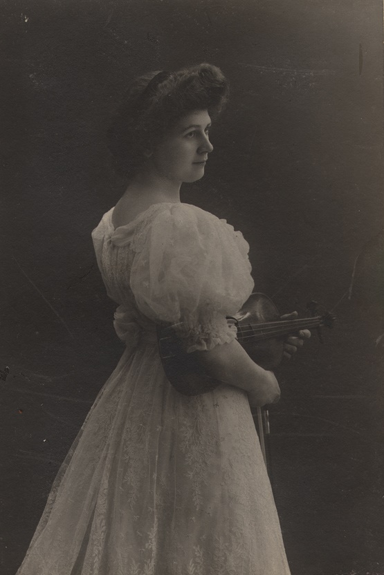 Fotografie der Violinistin Melanie Michaelis (1882-1969)